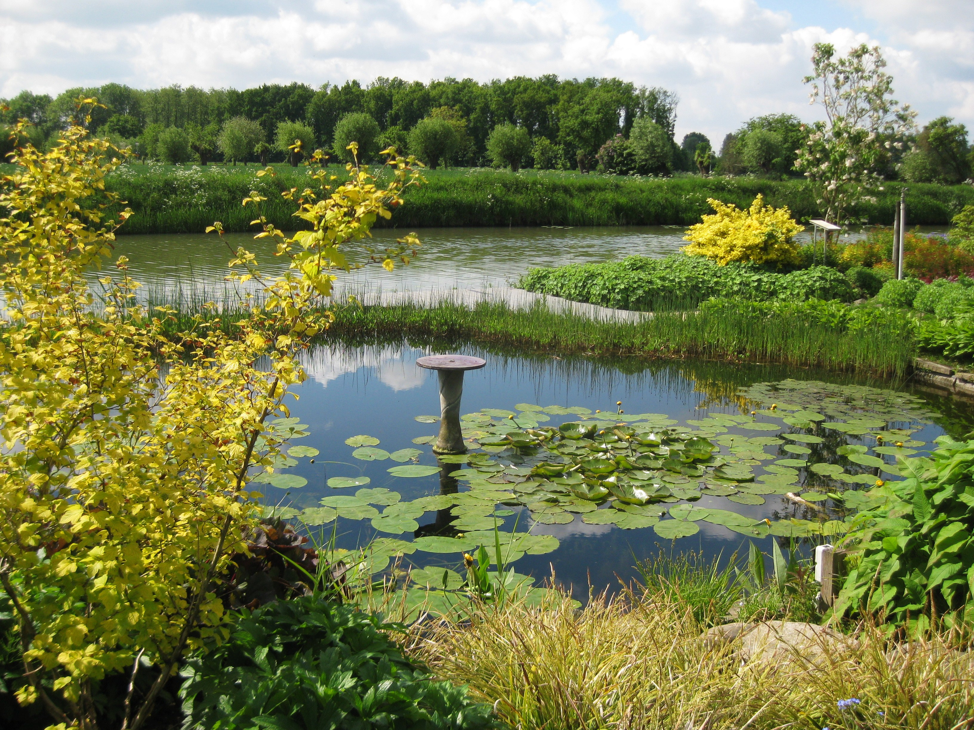 Vijvertuin bij De Tuinen van Appeltern in Gelderland